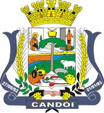 Brasão do município de Candói - PR